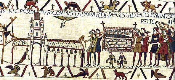 Translation du corps de Saint-Edouard, roi d'Angleterre (tapisserie de Bayeux)